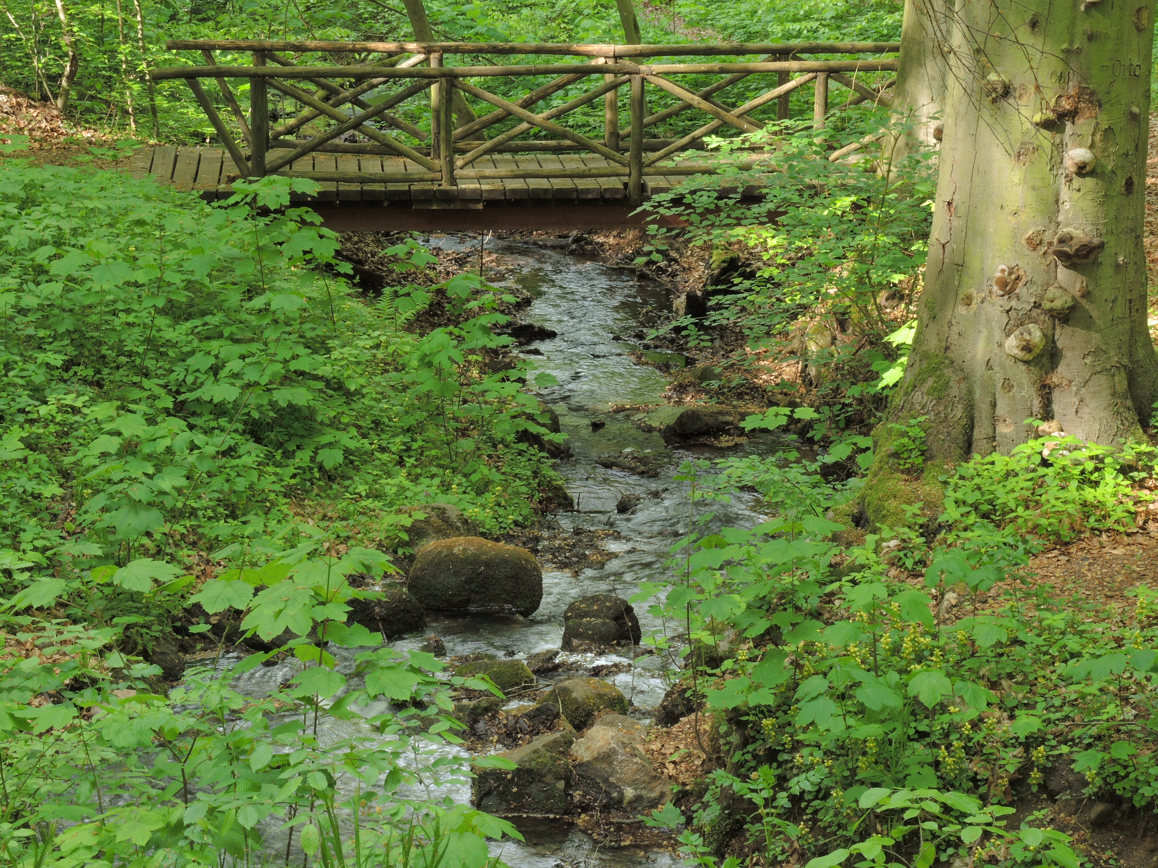 Brandenburg: Märkisch Oderland: Flora-Fauna-Habitat Cöthener Fliesstal, südöstlicher Teil, Brücke nahe Wasserfall